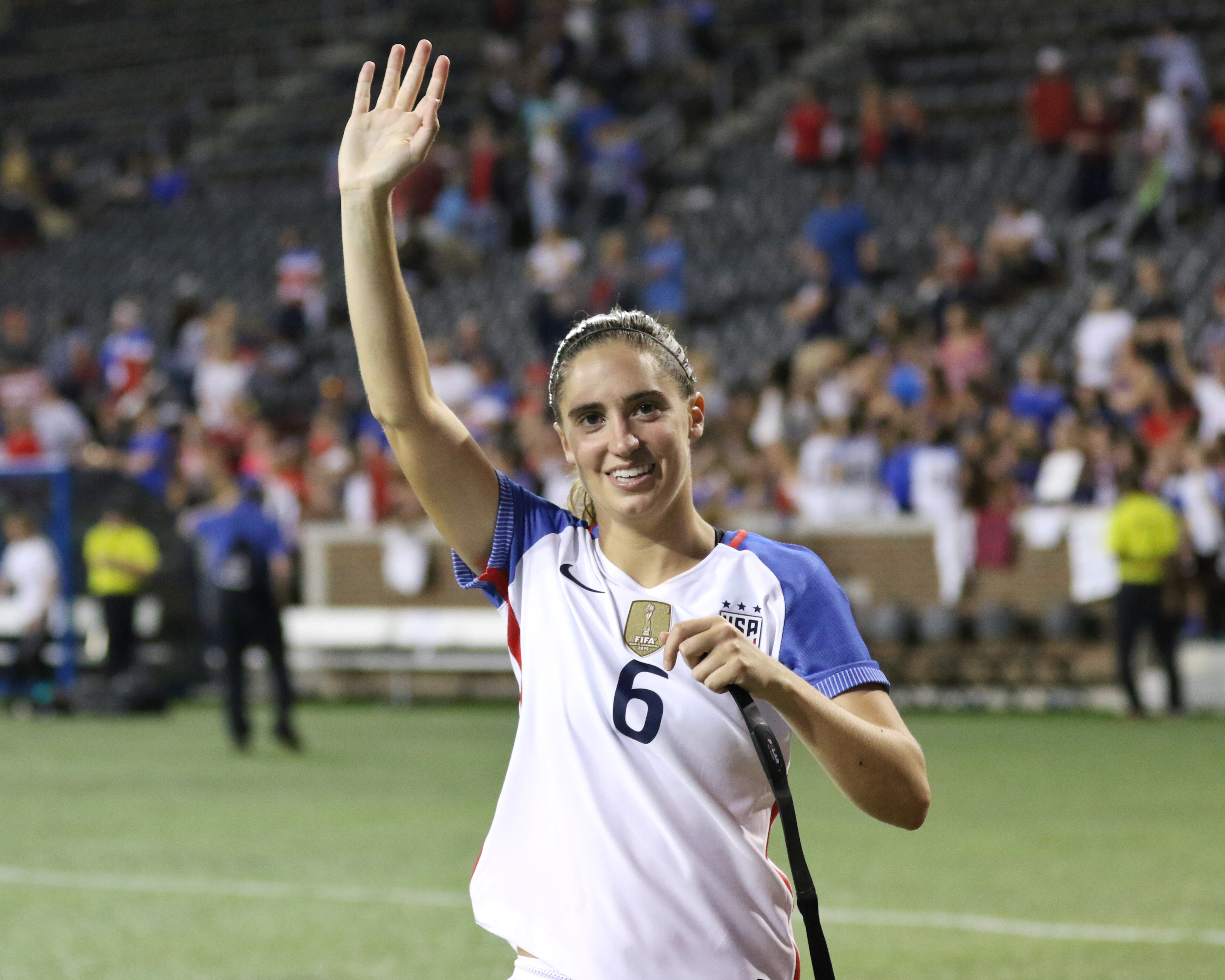 MorganBrian